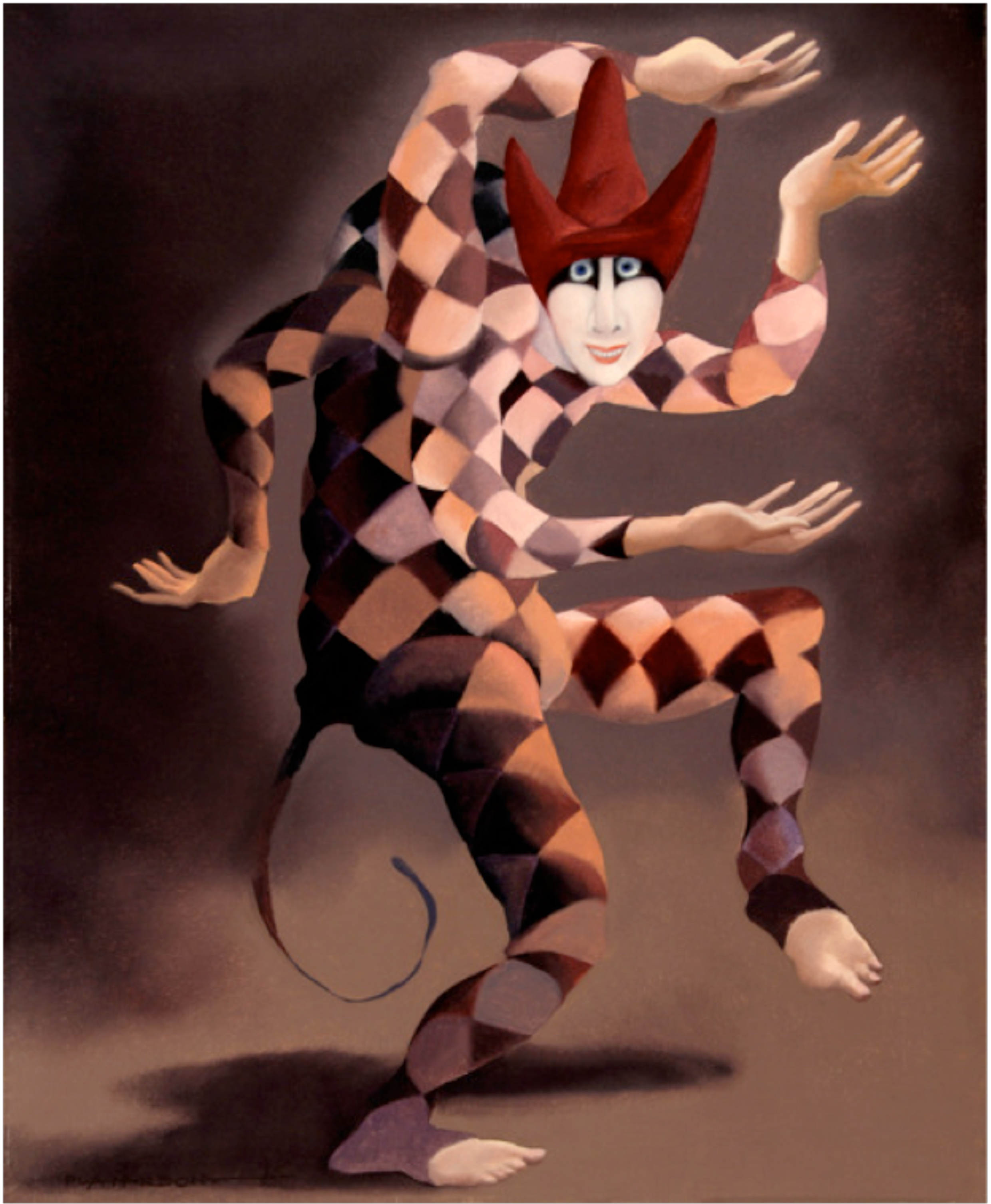 Oli de Josep Pla-Narbona